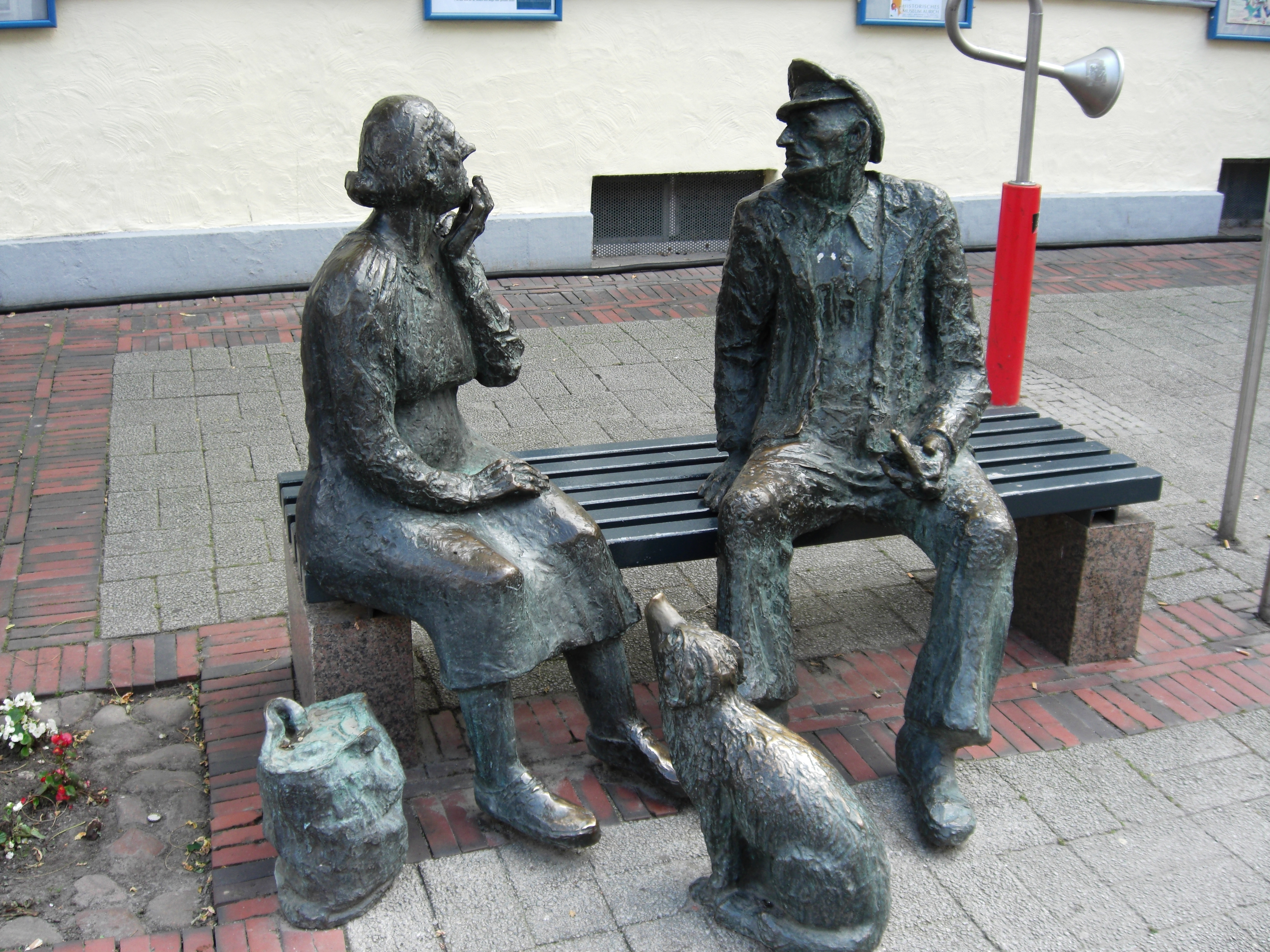 Aurich, Niedersachsen, Skulpturengruppe "Oma und Opa" vor dem Historischen Museum in der Fußgängerzone